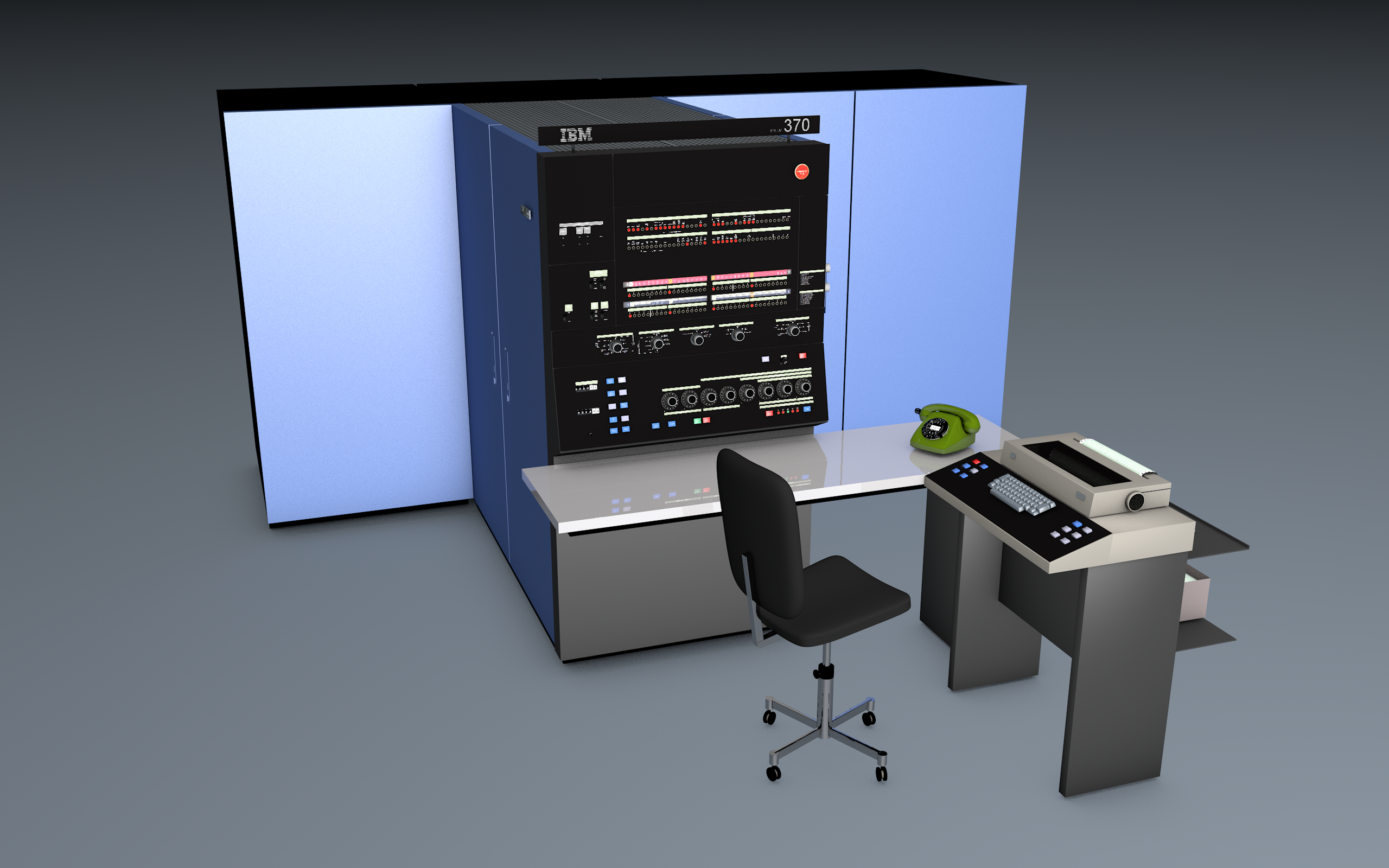 IBM Großrechner Typ 370-145 Baujahr 1970